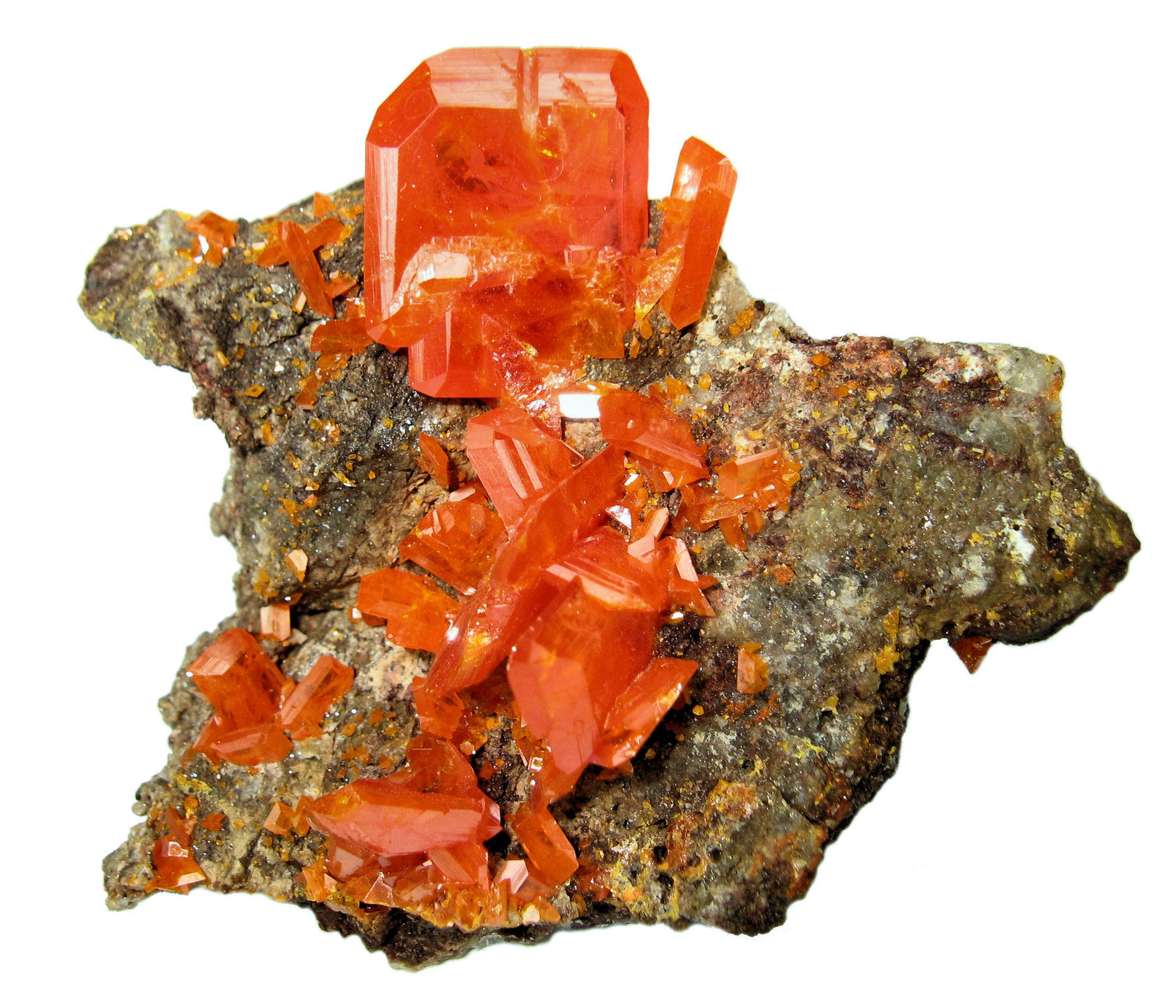 Cristalls de wulfenita procedents de Red Cloud Mine, Silver District, Trigo Mts, La Paz Co., Arizona, EUA